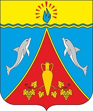 Герб Черноморского района Республики Крым РФ. Утвержден Решением Черноморского районного совета от 28 августа 2015 года № 284 "О проекте Решения Черноморского районного совета Республики Крым "Об утверждении Положения о гербе муниципального образования Черноморский район Республики Крым". До 2015 года являлся малым гербом Черноморского района.